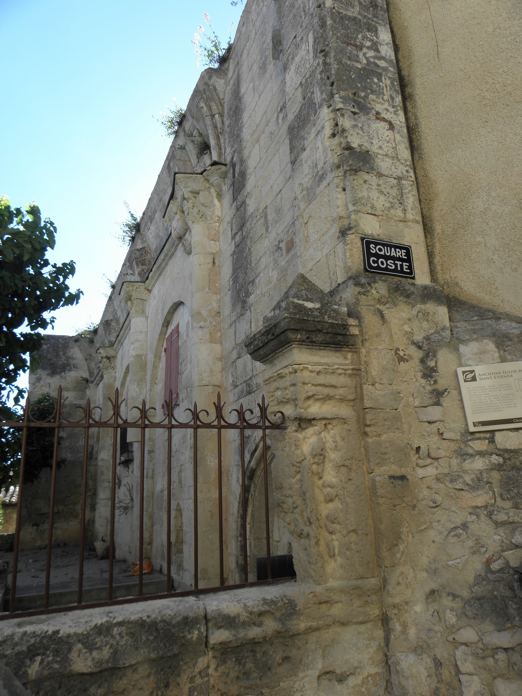 Église de l'Invention-de-Saint-Étienne de Castries (34). Costale intérieure nord de la nef.